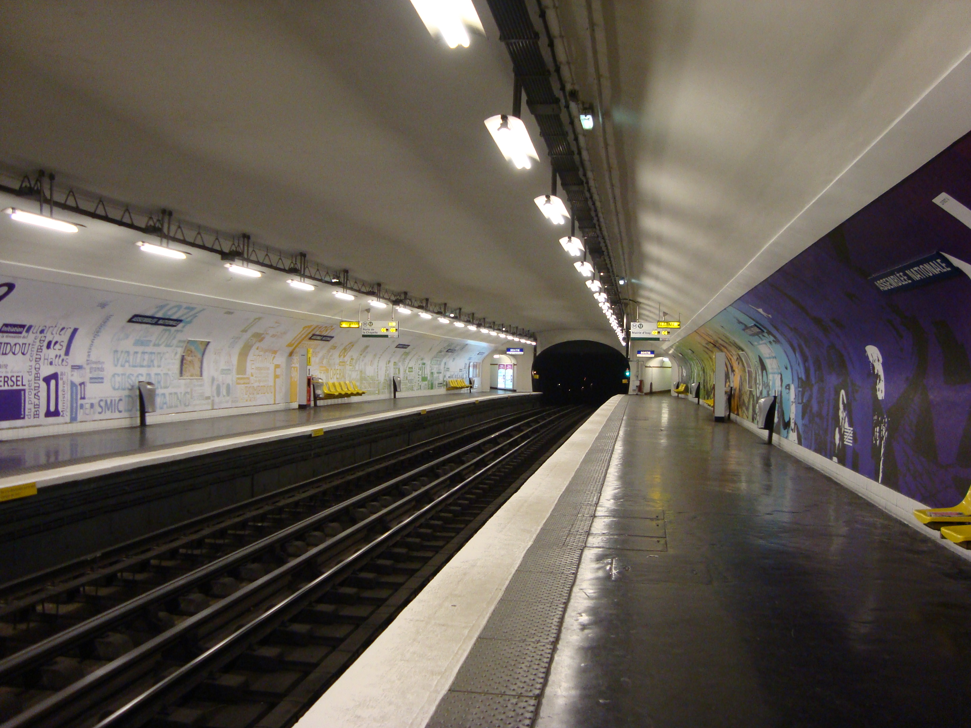 Station de métro Assemblée Nationale avec la nouvelle décoration d'octobre 2008 pour les 50 ans de la Constitution de la 5e République.